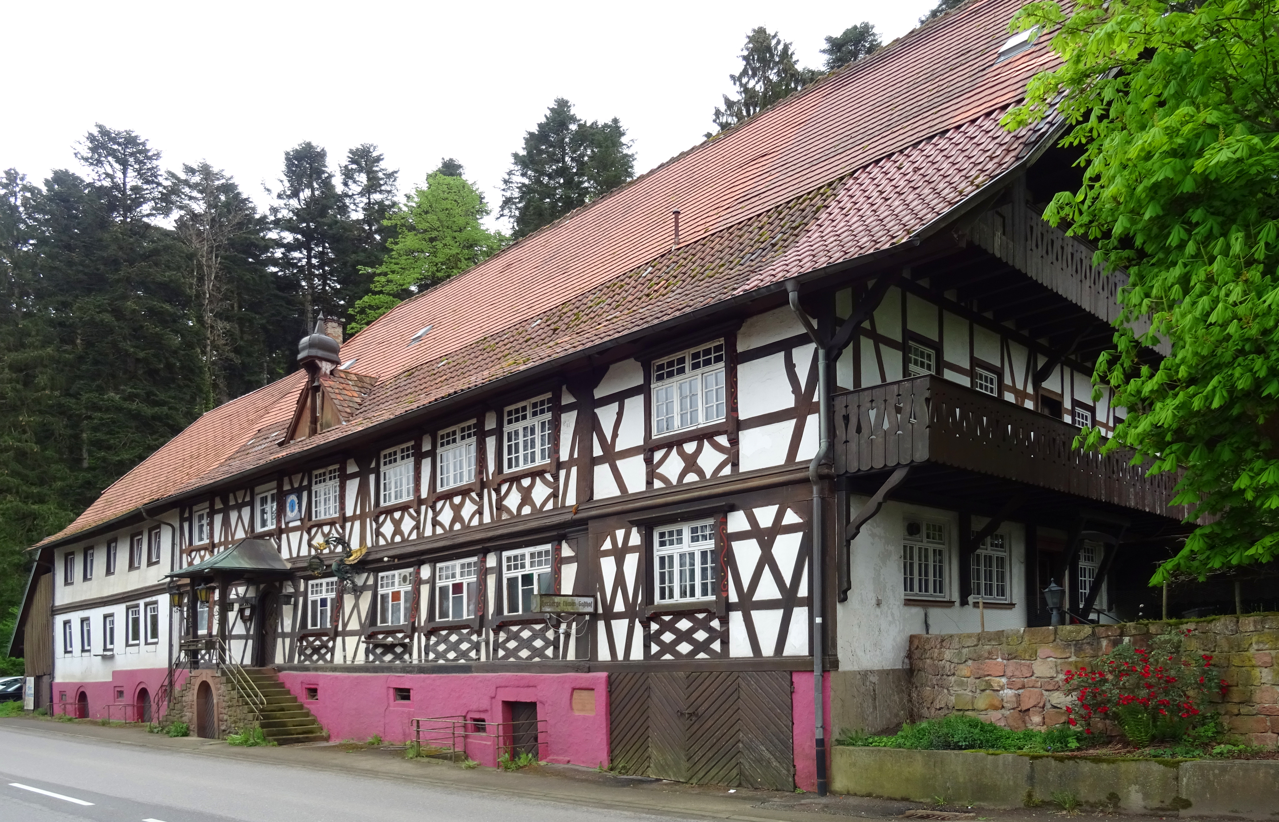 Herberge zum Löwen auf der Passhöhe in Seelbach-Schönberg. Ehemalige Lehenswirtschaft der Geroldsecker 1242. Als „Herberge am Berg“ 1370 urkundlich erwähnt.